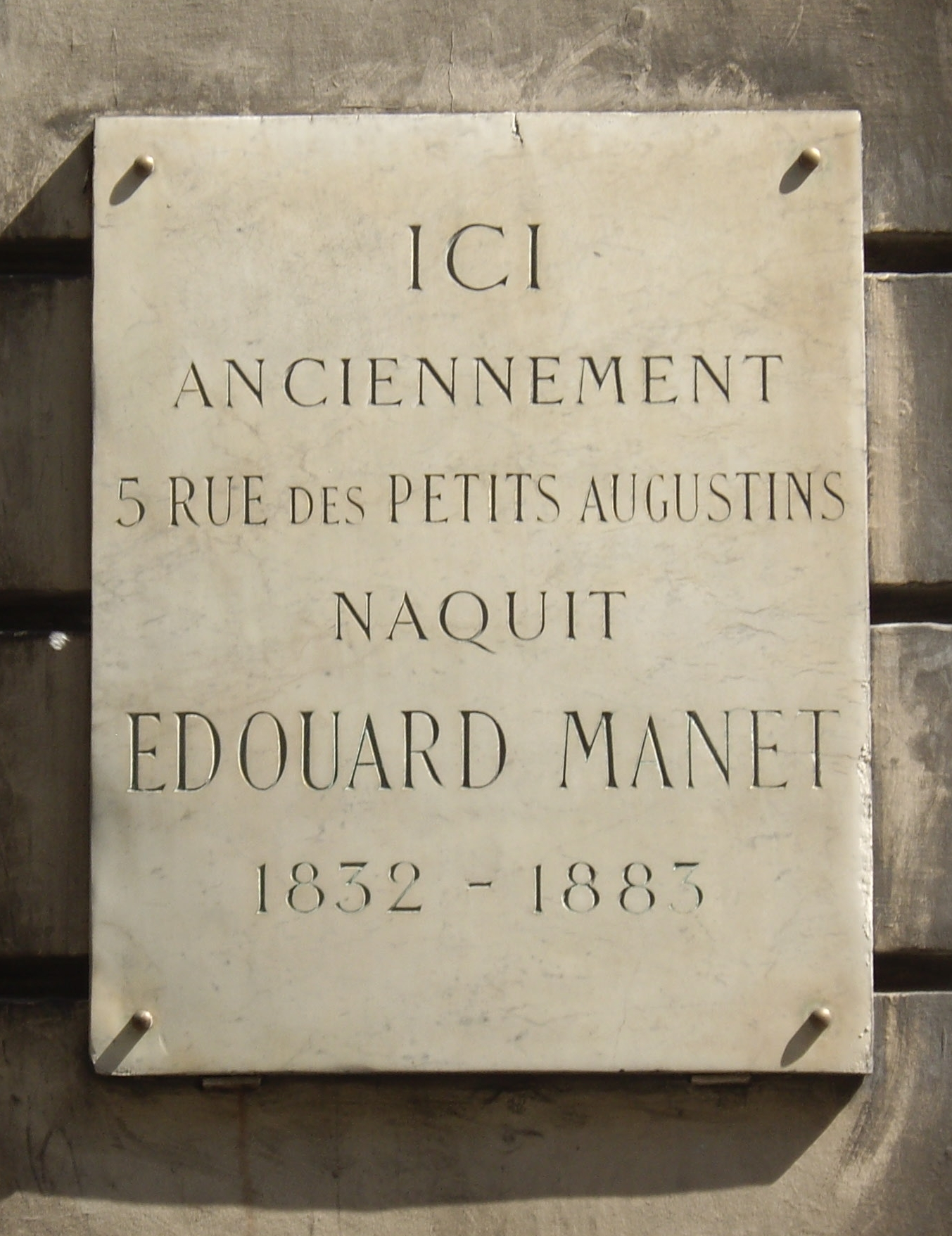 Plaque apposée au n° 5 de la rue Bonaparte, anciennement rue des Petits-Augustins, Paris 6e, où est né le peintre Édouard Manet (1832-1883) le 23 janvier 1832. (Ici anciennement 5 rue des Petits Augustins naquit Edouard Manet 1832-1883).